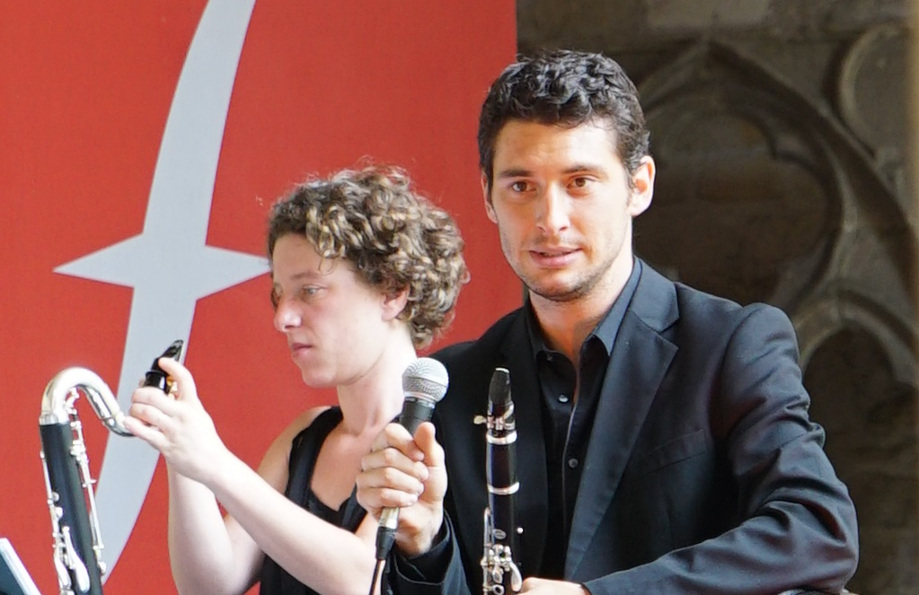 le Quatuor Anches hantées lors des Flâneries musicales 2015.